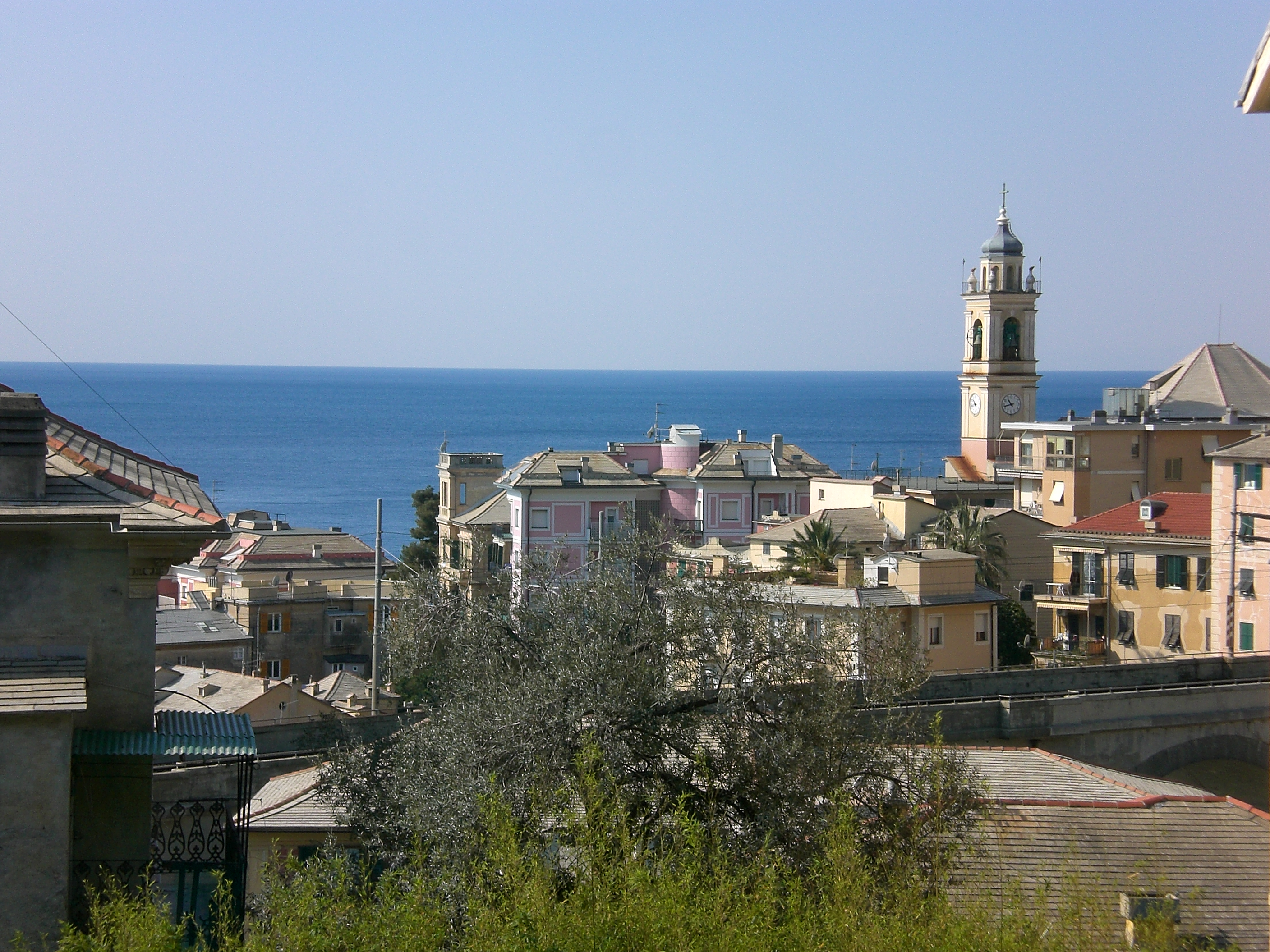 Bogliasco, Provincia di Genova, Italia